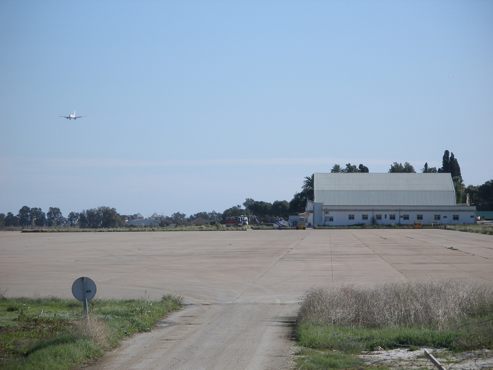 Base Aérea de San Julián, plataforma militar del Aeropuerto de Málaga, situada justo enfrente de la terminal civil. En la actualidad no hay aparatos militares destacados en esta base. Comments: Military platform of Malaga Airport (San Julian Airbase), in front of the civil airport. Date: Dec. 8, 2006 Author: Sergio Echeverria Garcia.